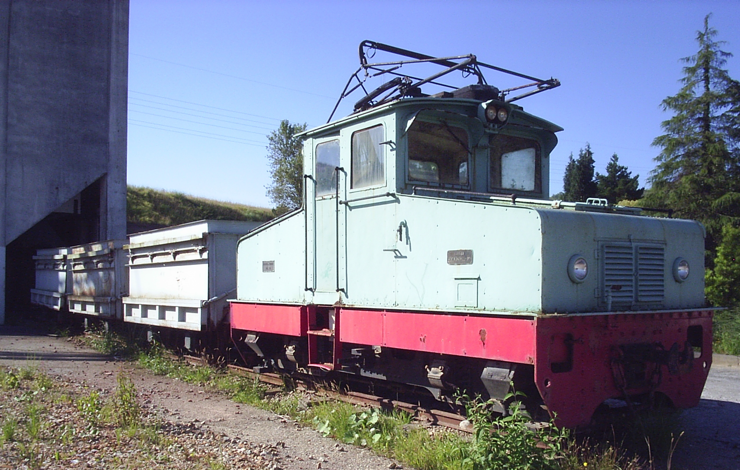 Locomotora para el transporte del mineral de la mina de Reocín, Cantabria, España